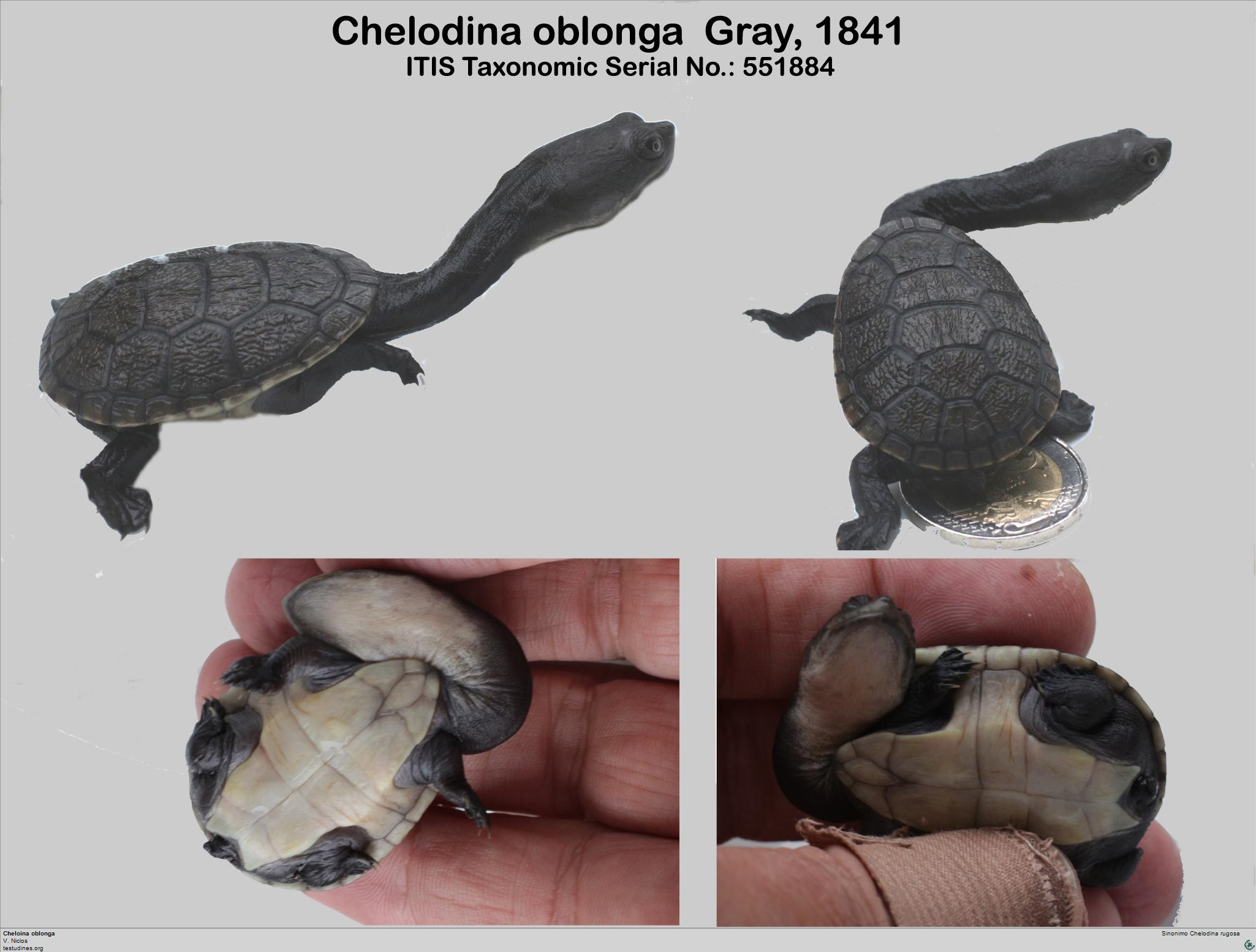 Chelodina oblonga, baby